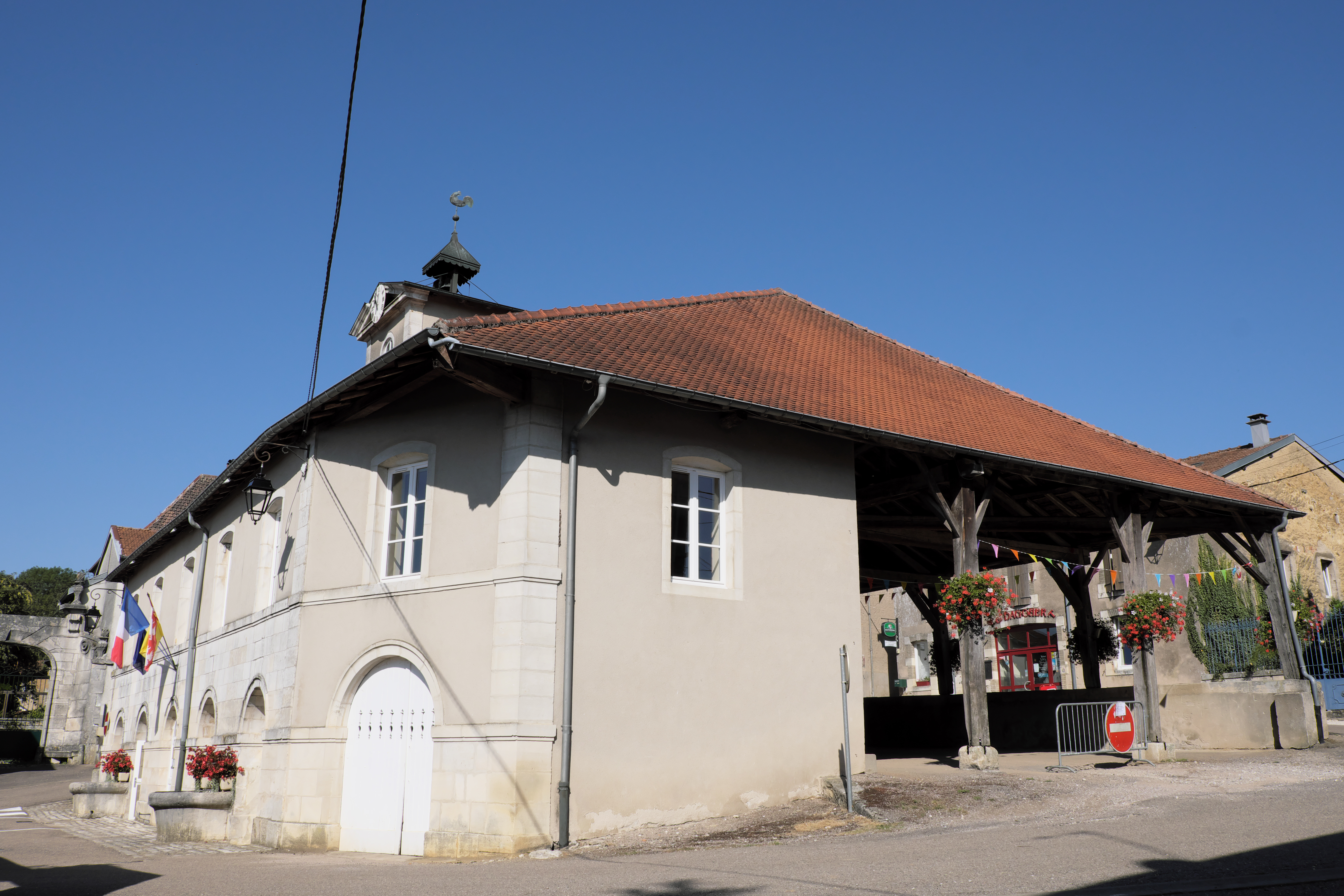 La mairie-halle de Vicherey dans le département des Vosges